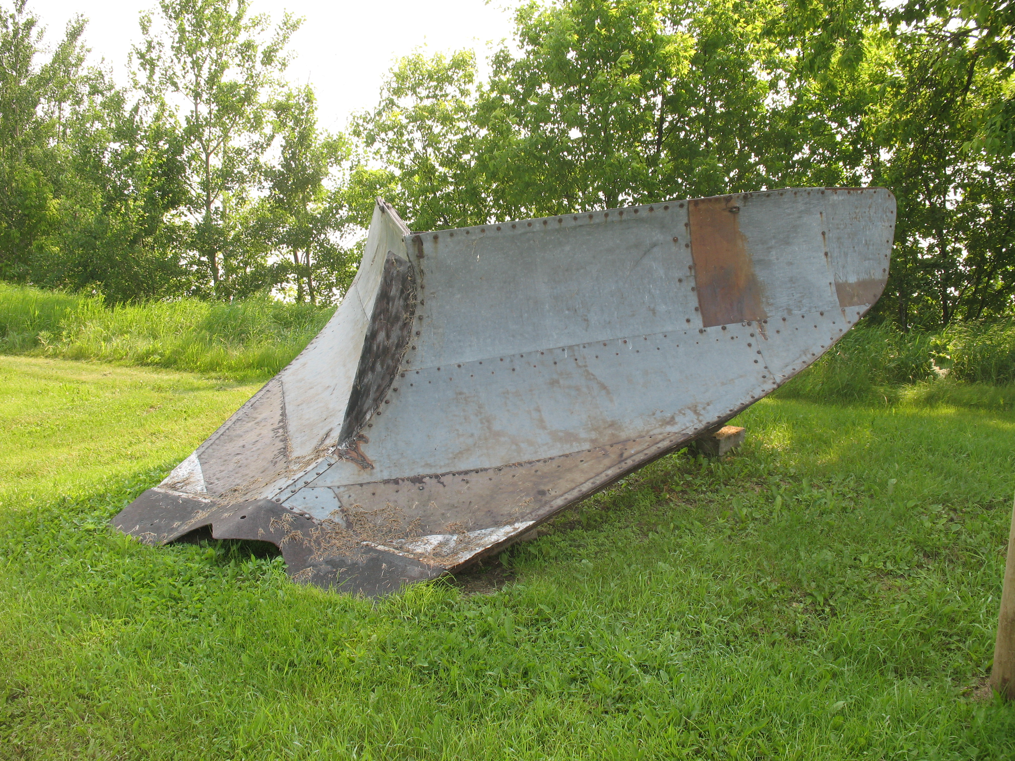 Schneeschieber, mit dem die Eiswege über den zugefrorenen Winnipegsee freigehalten wurden